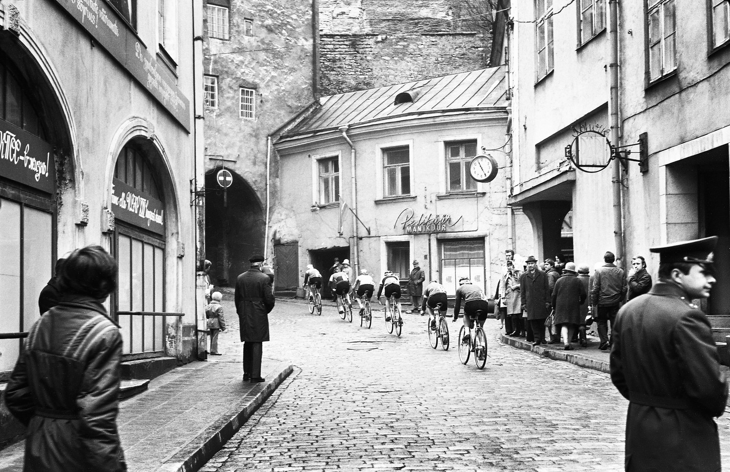 Tallinna ratas 75 (01)